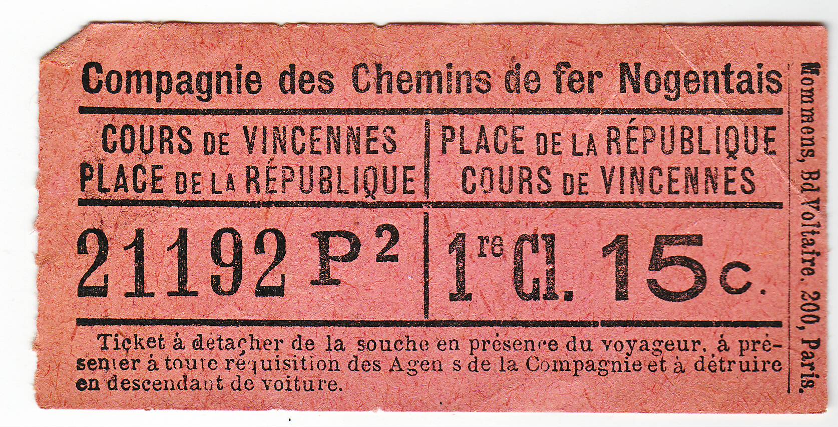 Billet de tramway, compagnie des Chemins de fer Nogentais